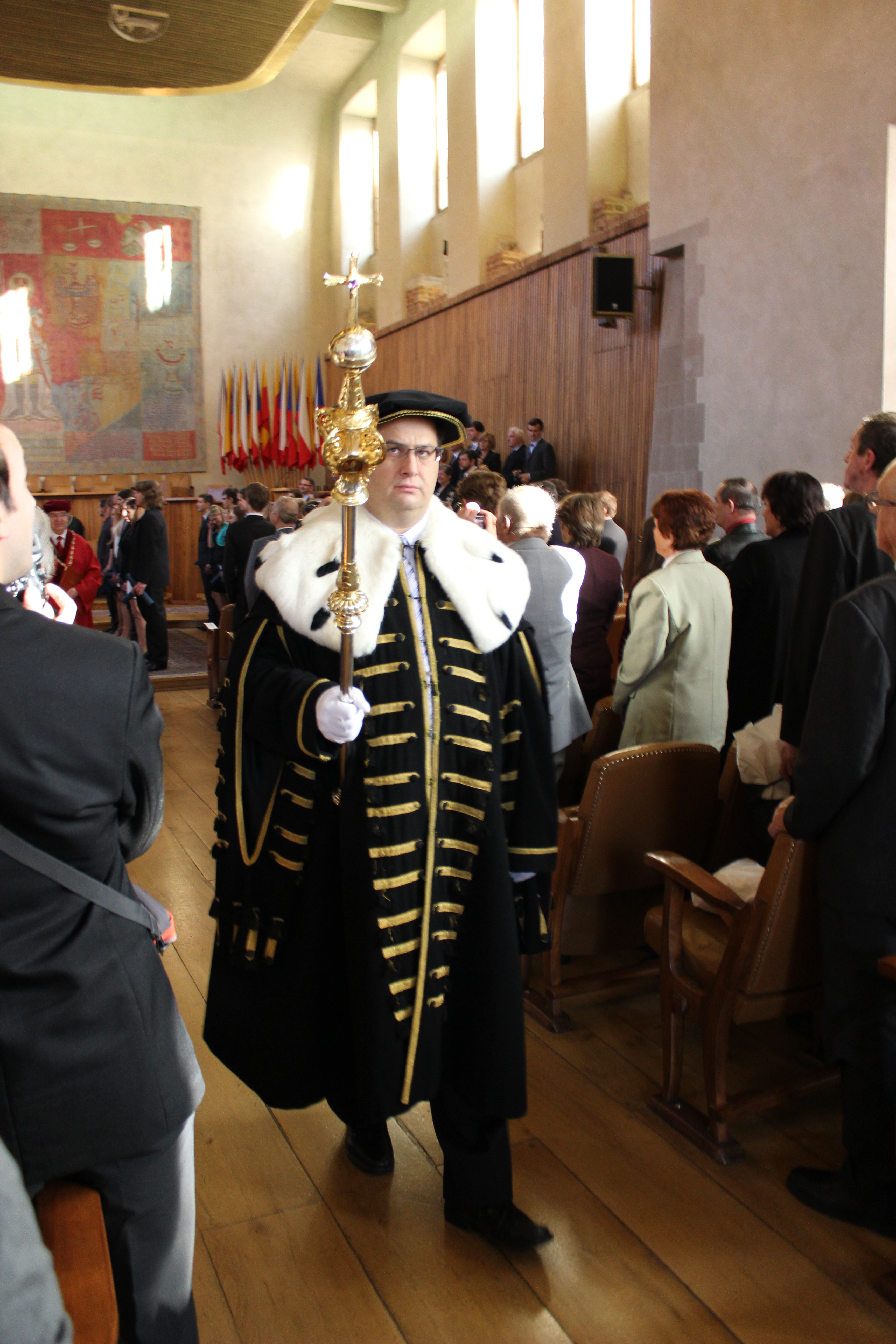 Odchod univerzitních hodnostářů z promočního aktu.